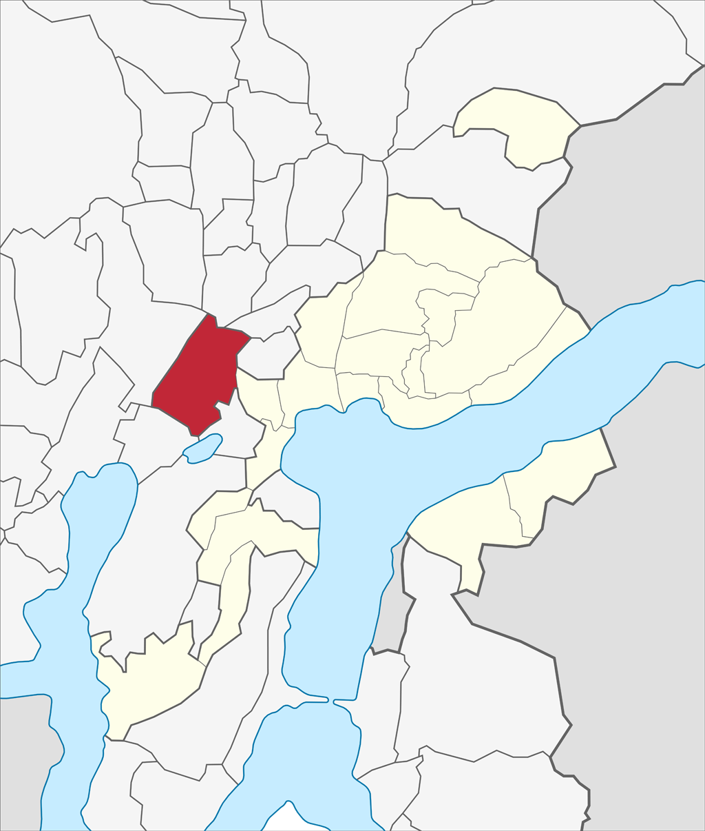 Localizzazione del quartiere di Breganzona nel territorio comunale di Lugano